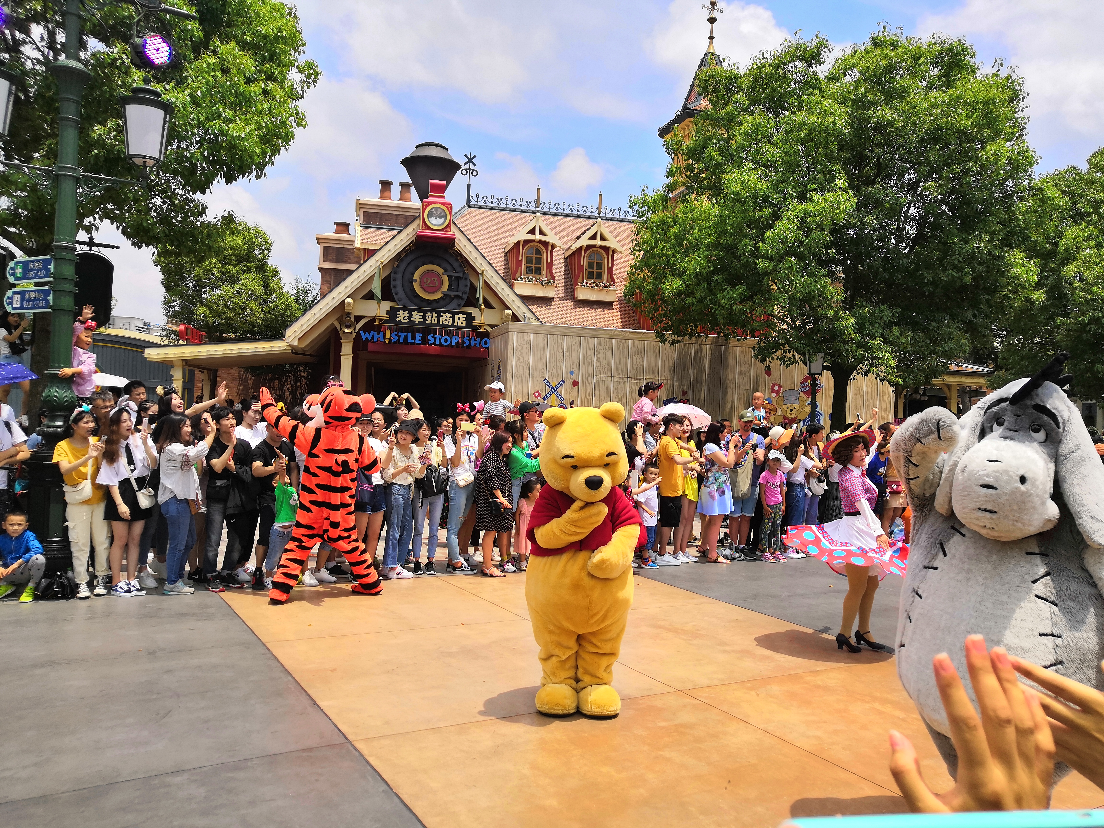 上海迪士尼